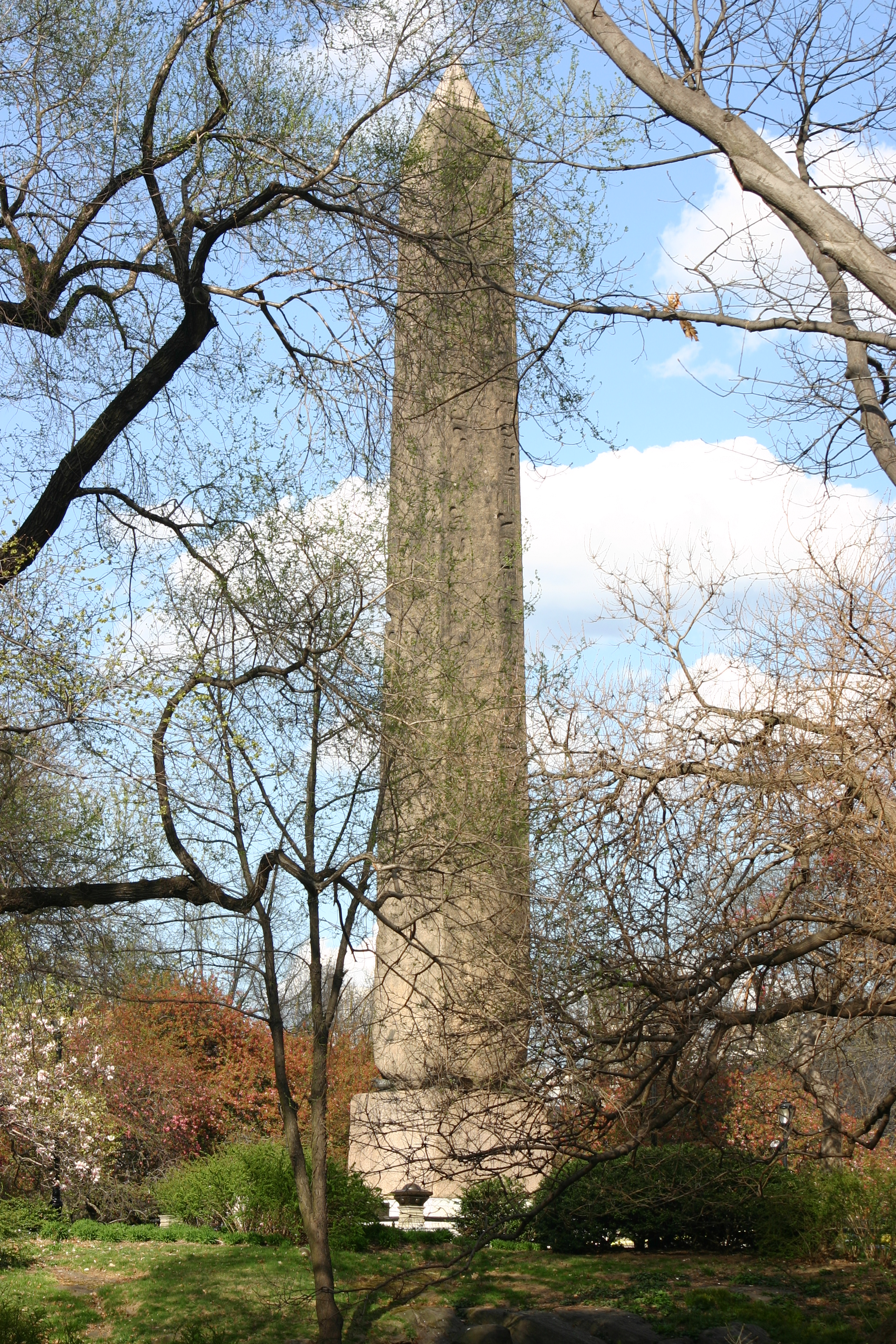 Obelisk in Central Park, New York City